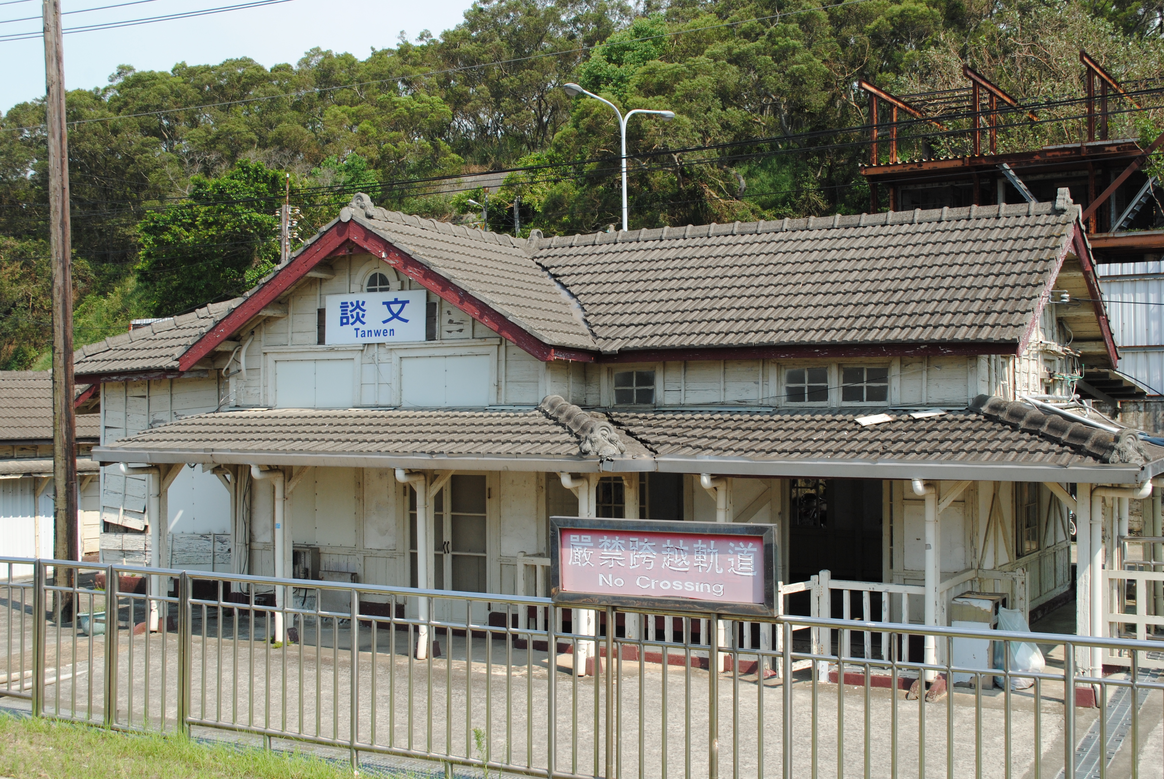 談文車站站舍。